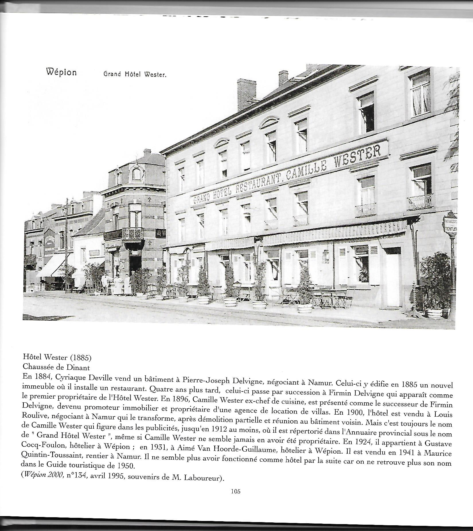 wépion était une commune fort animée fin du 19° , d'où l'apparition de nombreuses Villas "Mosanes", ici le Grand Hotel Wester existant toujours sous la forme d'un petit café typique